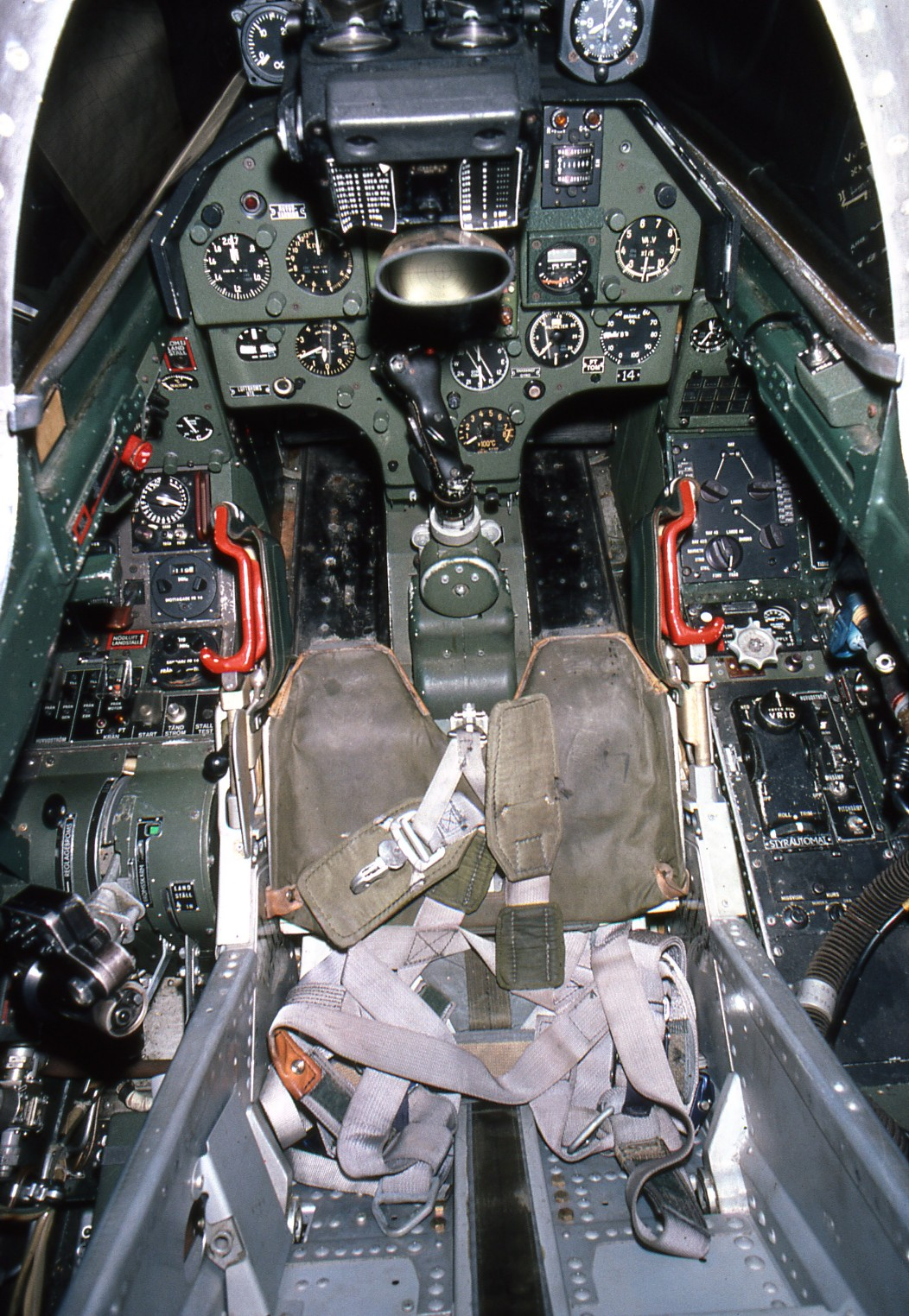 Saab J 35A Cockpit